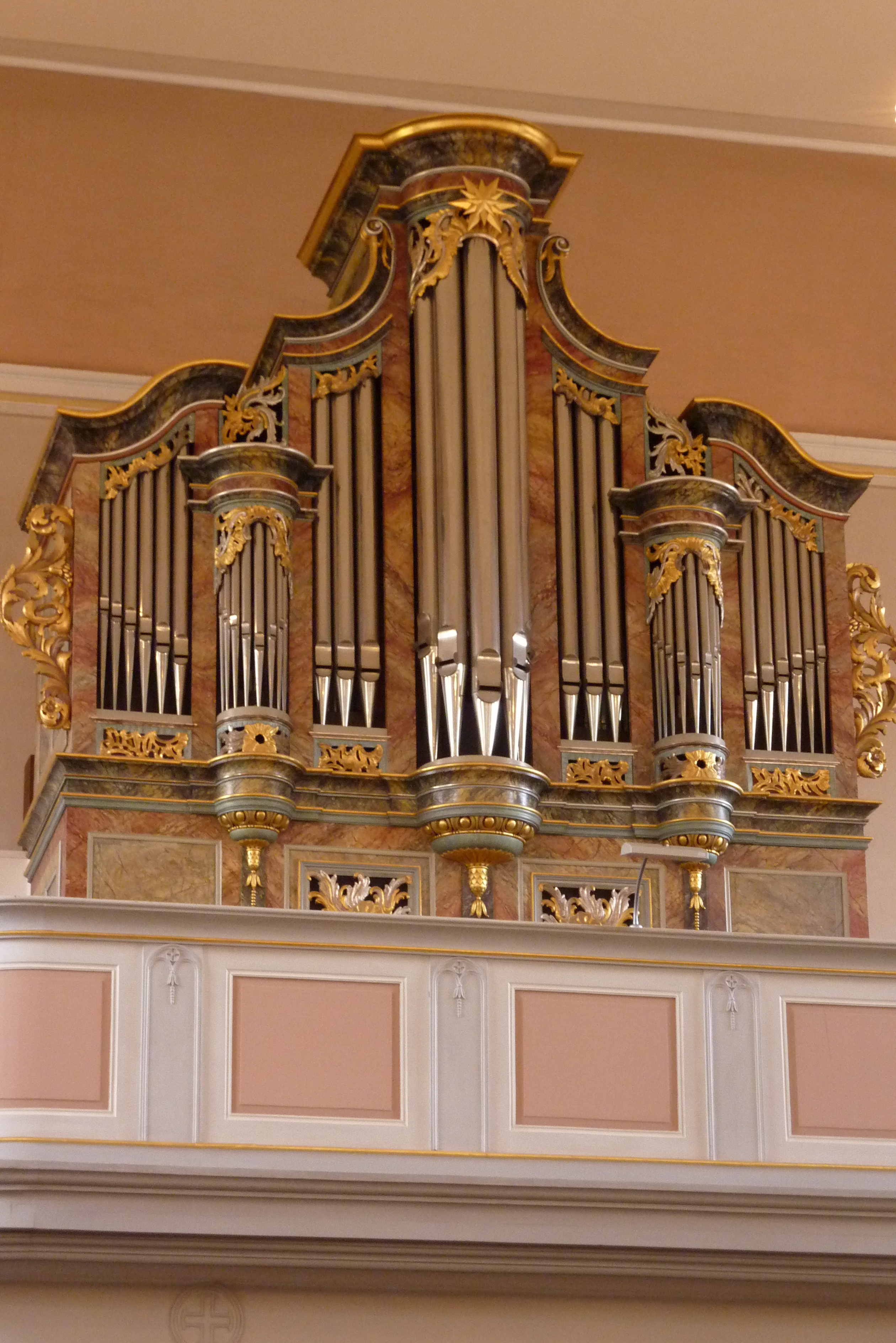 Katholische Pfarrkirche St. Martin in Hillesheim, Orgel